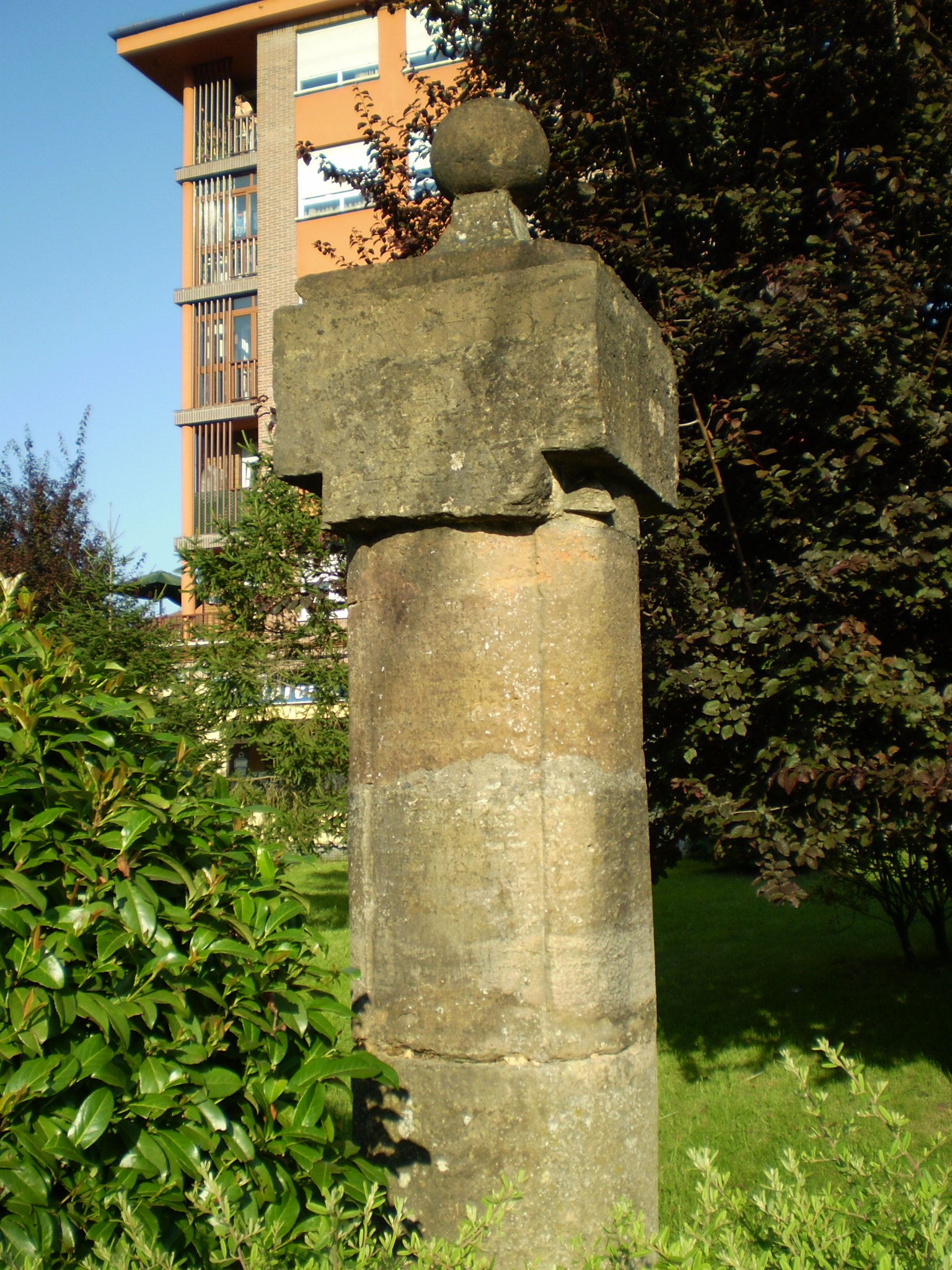 Mojón de la media legua en Oviedo.